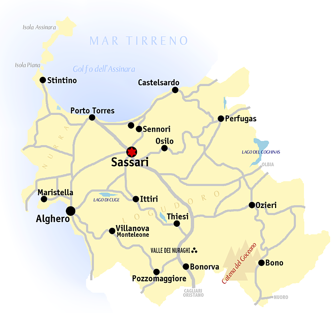 Kaart van de provincie Sassari